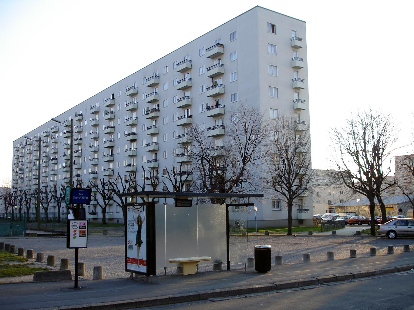 La cité du Pont de Pierre à Bobigny (Seine-Saint-Denis), France Vue arrière de l'immeuble de la rue d'Alembert, depuis l'arrêt de bus « Les Courtillières », au nord-est du bâtiment. Avril 2007 Photo personnelle de Clicsouris